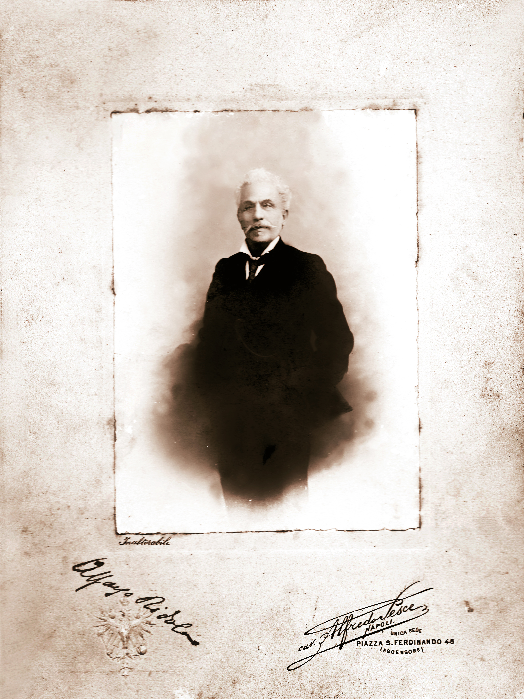 Biografia dell’avvocato e letterato Alfonso Ridola 1843–1917 Napoli